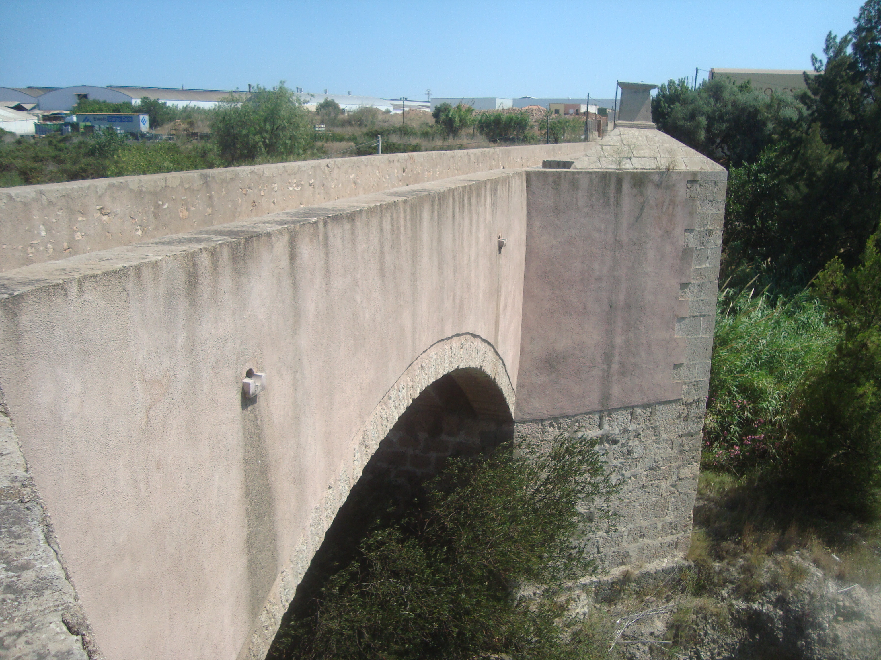 Pont de Santa Quitèria (Almassora i Vila-real)